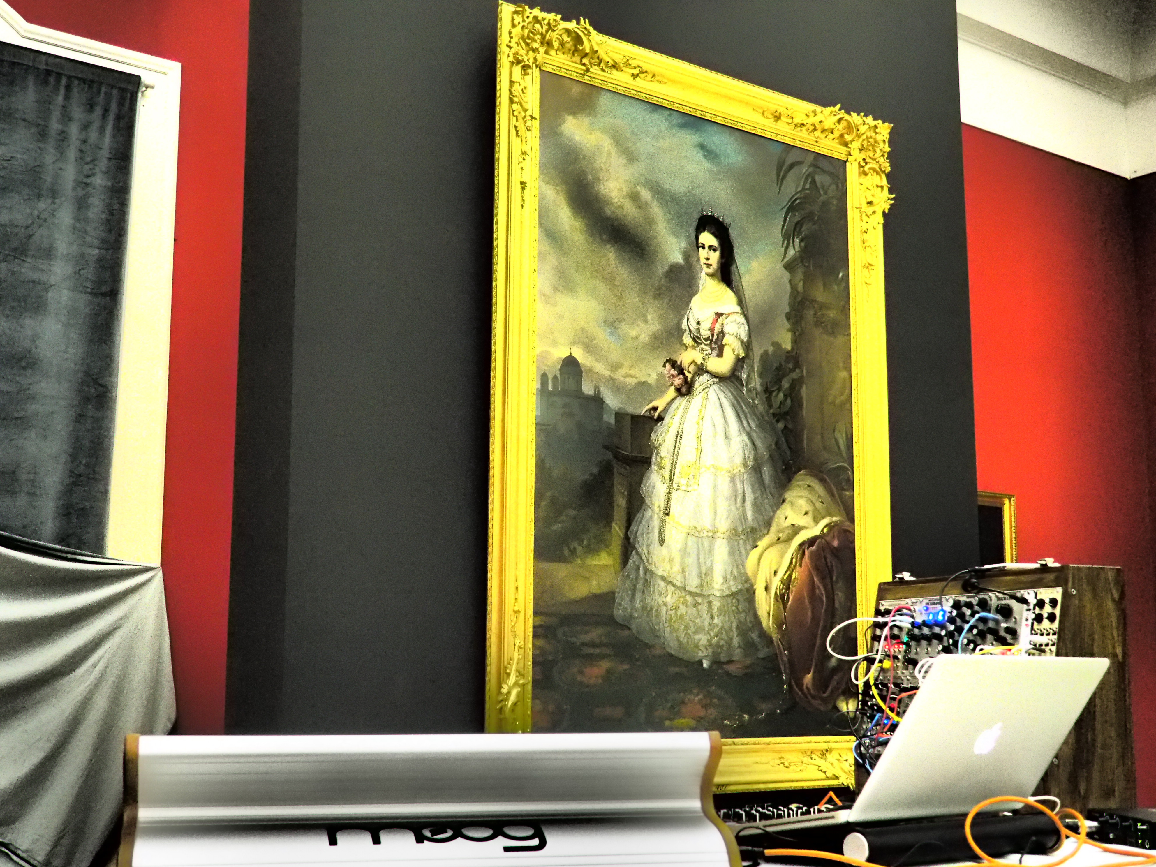 Az első aranykor - Műcsarnok